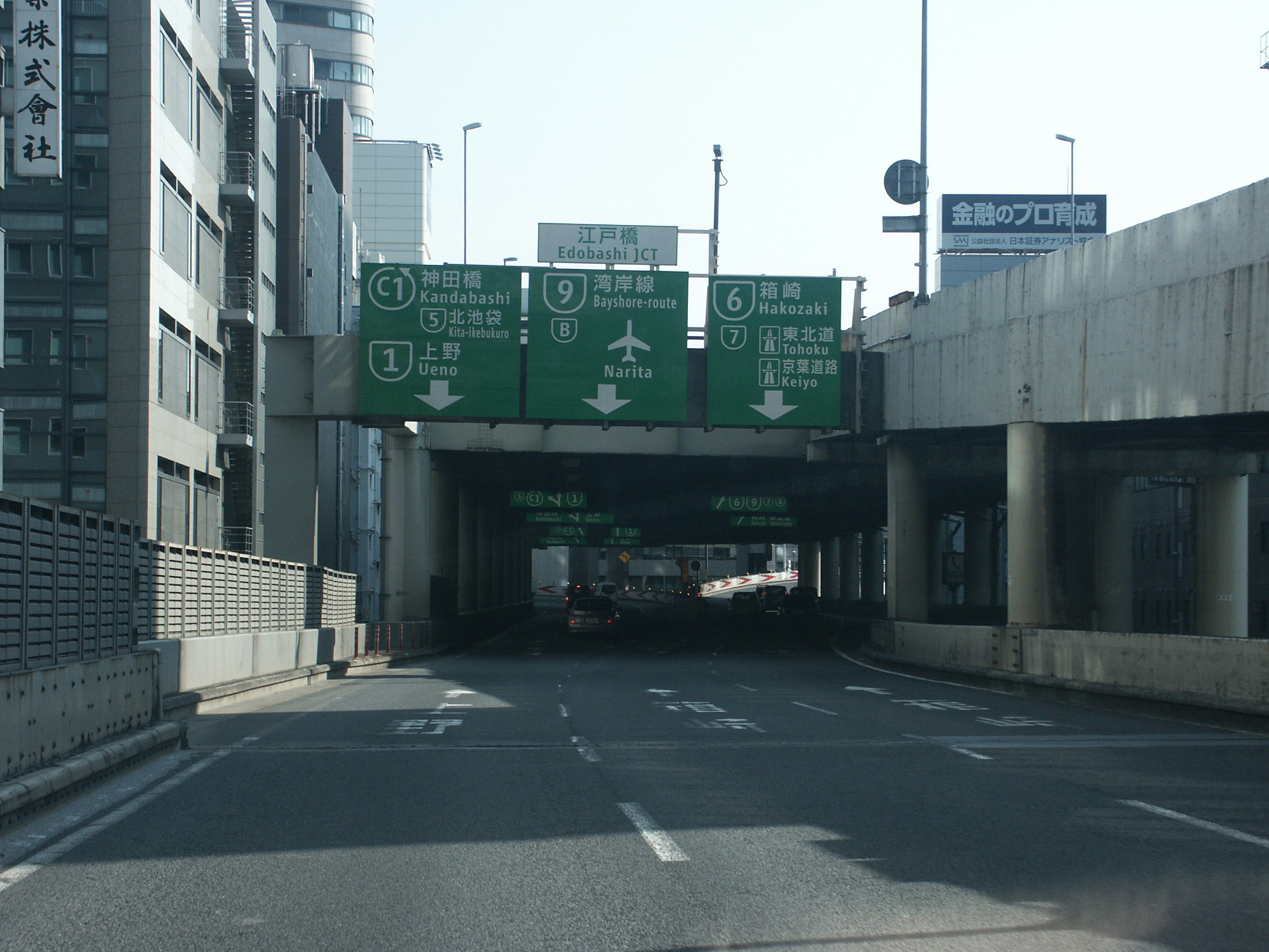 首都高速都心環状線江戸橋ジャンクション内回り側分岐付近